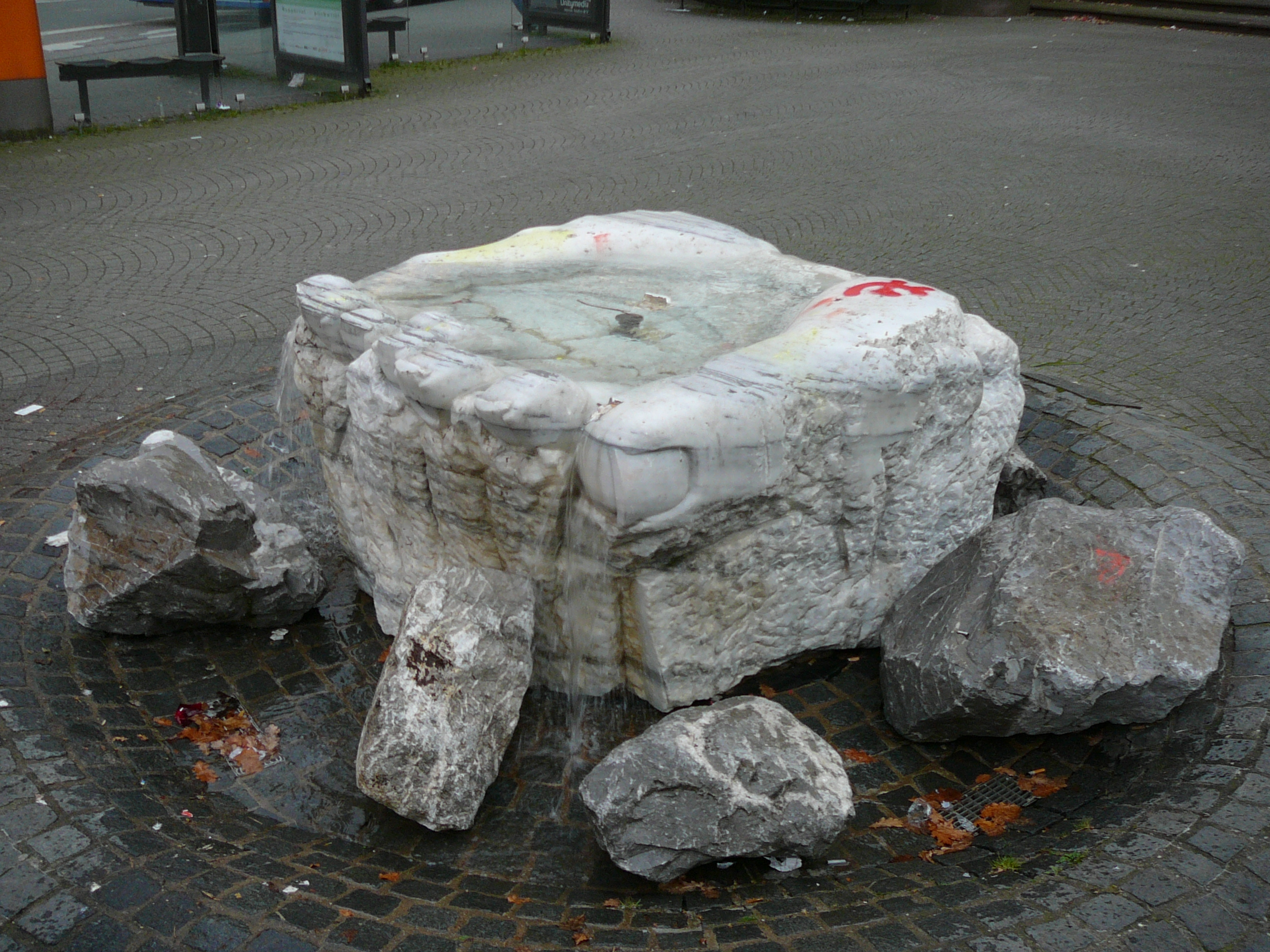 Wichlinghauser Markt, Wuppertal/Oberbarmen